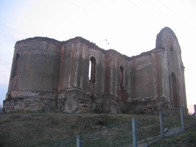 Беларуская (тарашкевіца): Халопенічы